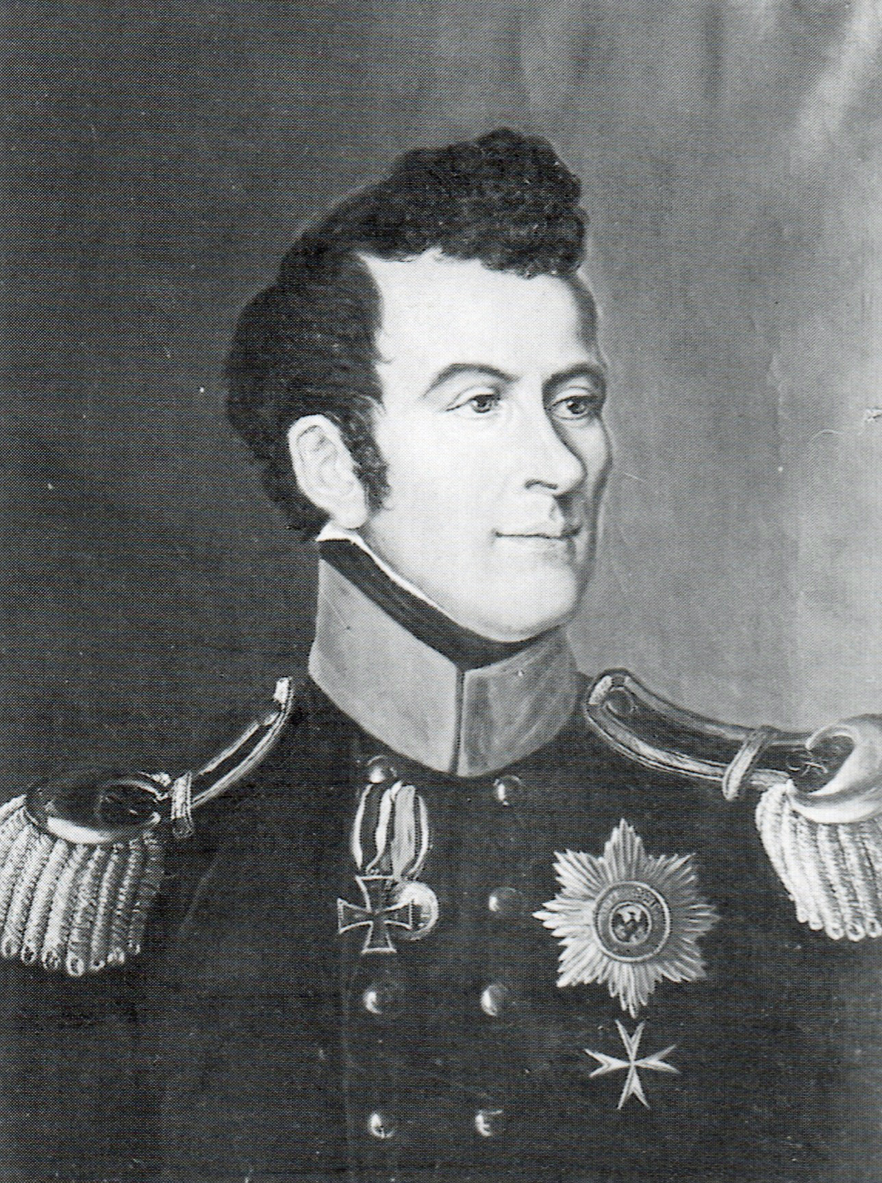 Ölgemälde von Karl Franz von Anhalt, früher im Schloß Königsberg.